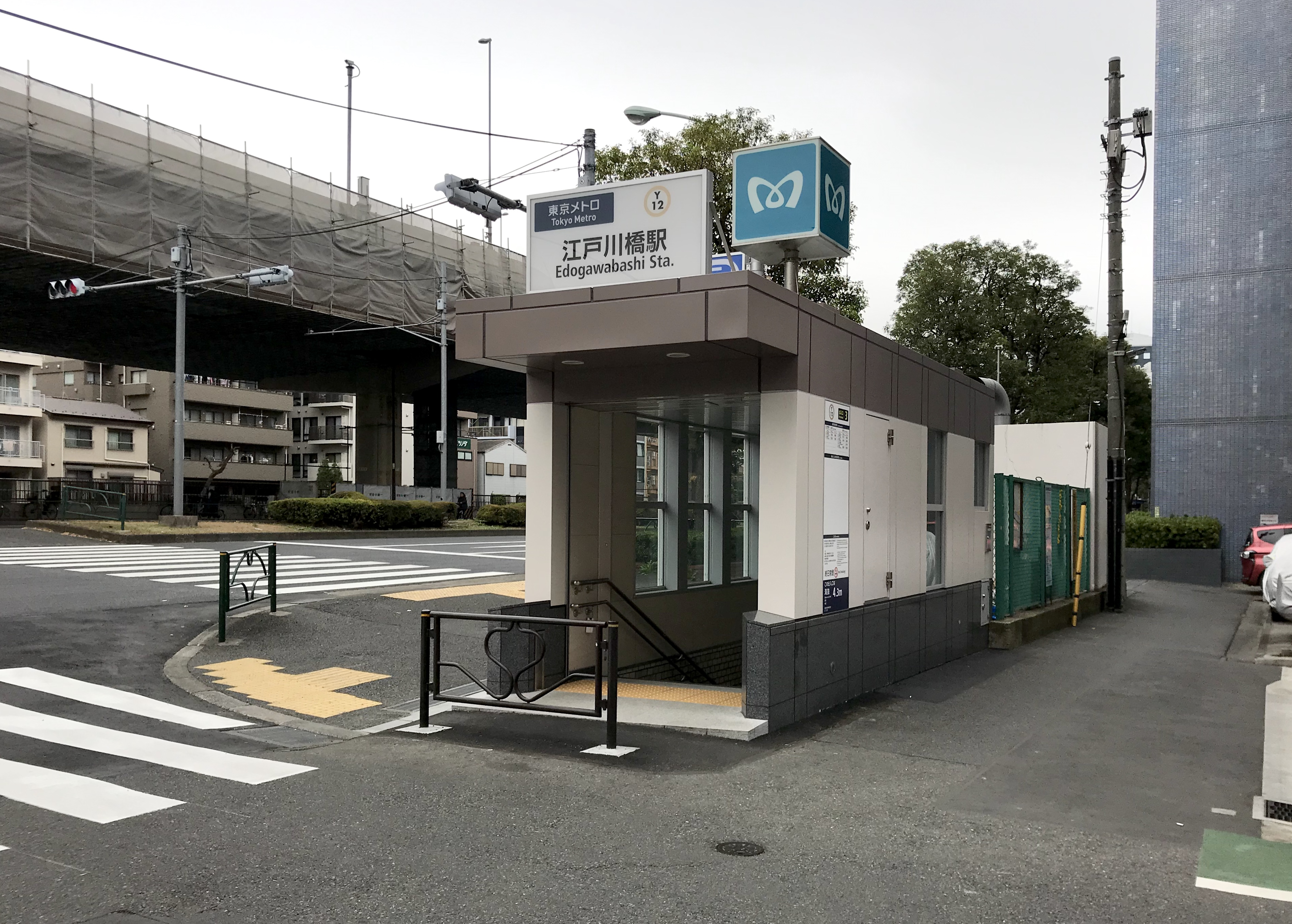 東京メトロ有楽町線江戸川橋駅3番出入口（リニューアル後）